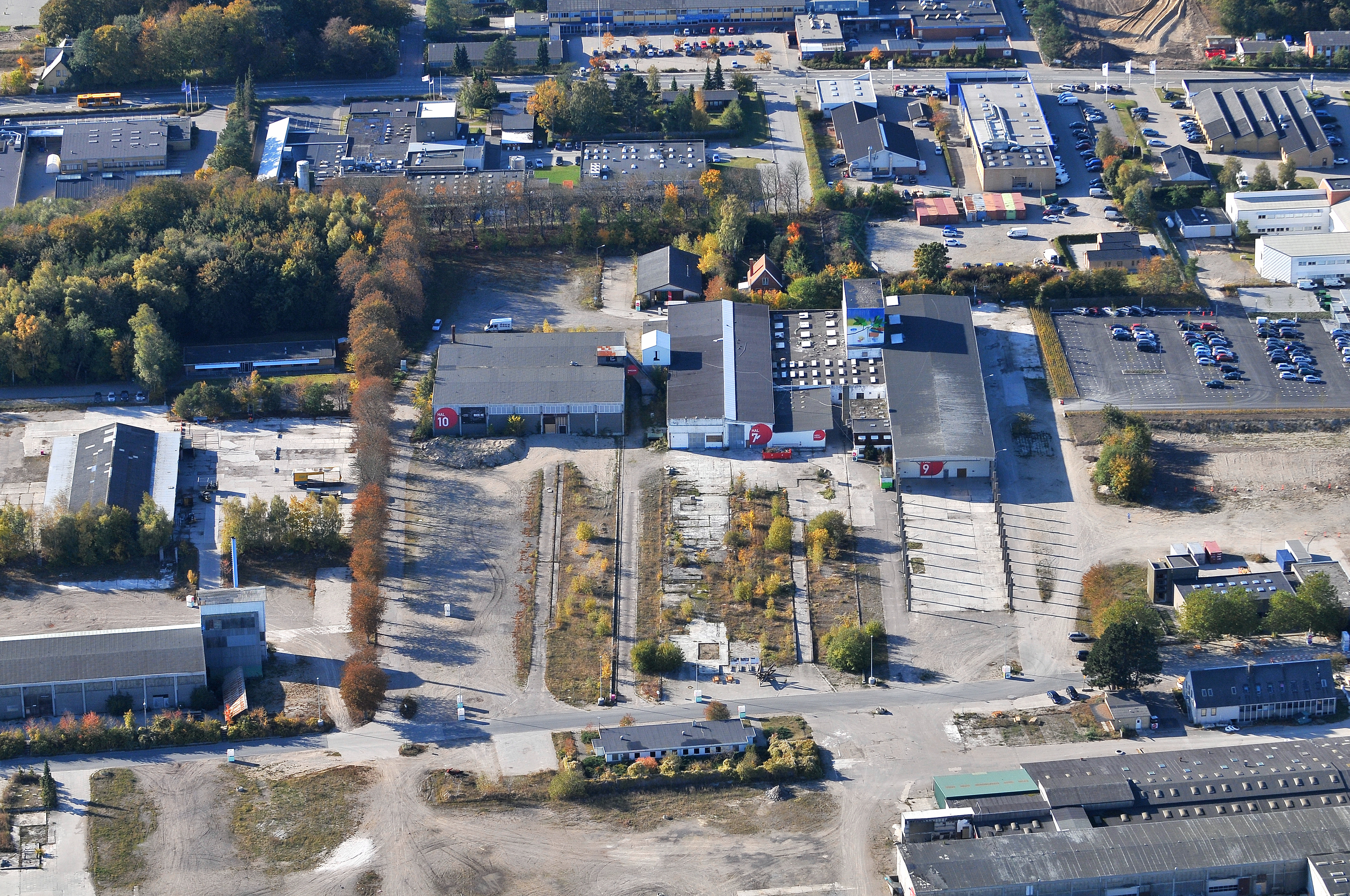 Luftfoto af Musicon